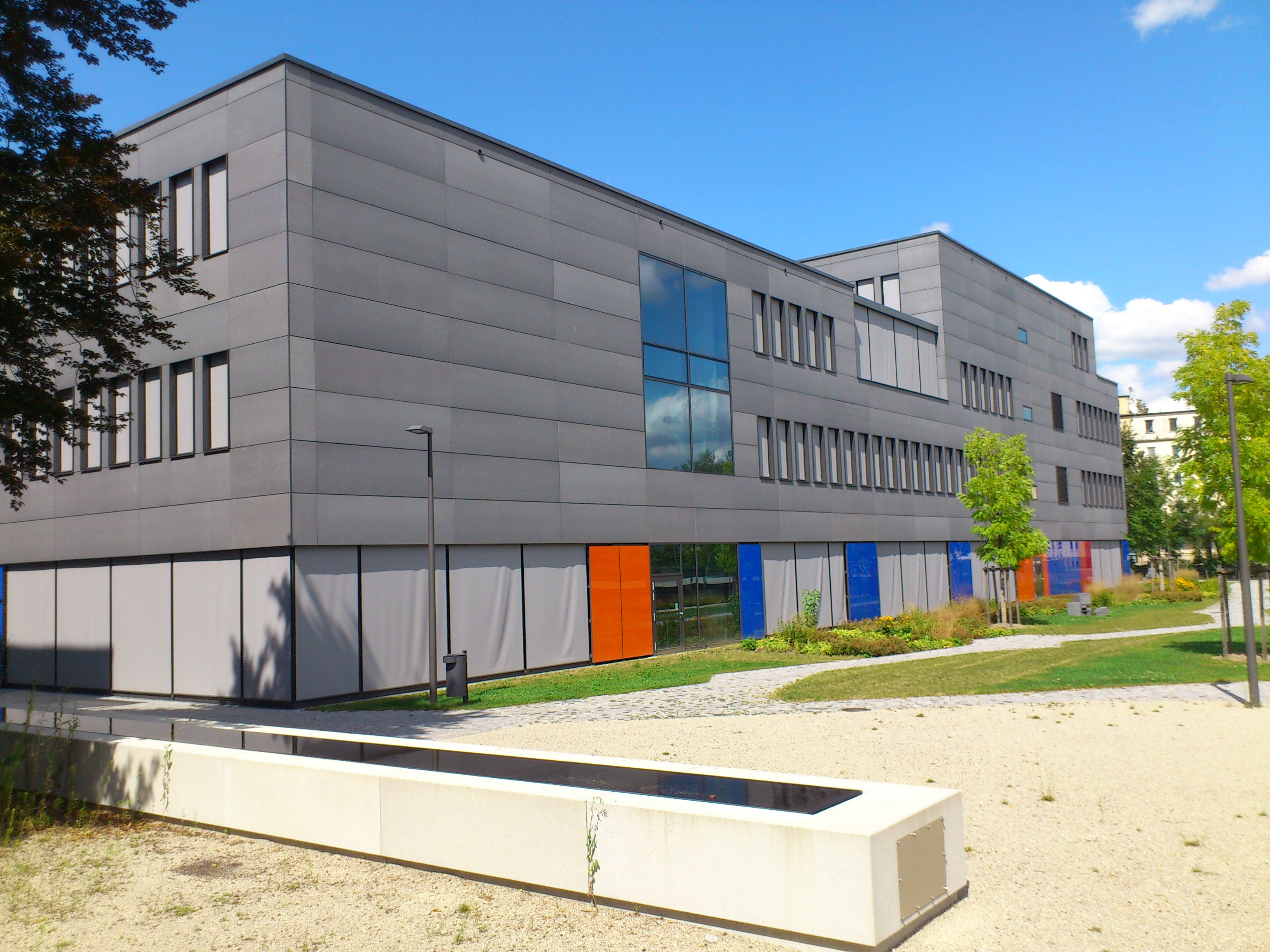 Hochschule Augsburg, Campus am Roten Tor, Gebäude W